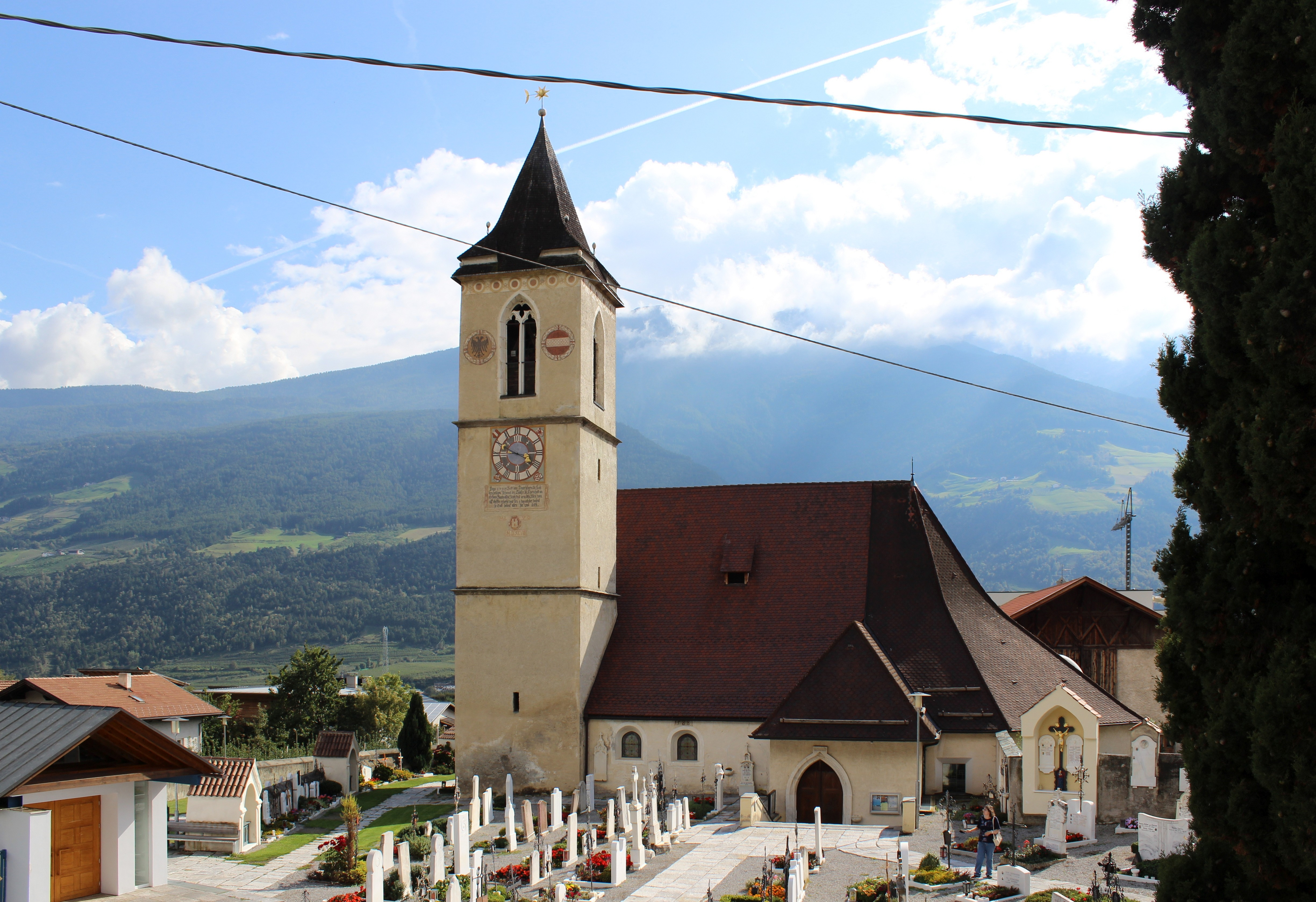 Pfarrkirche St. Johannes der Täufer mit Friedhof in Kortsch